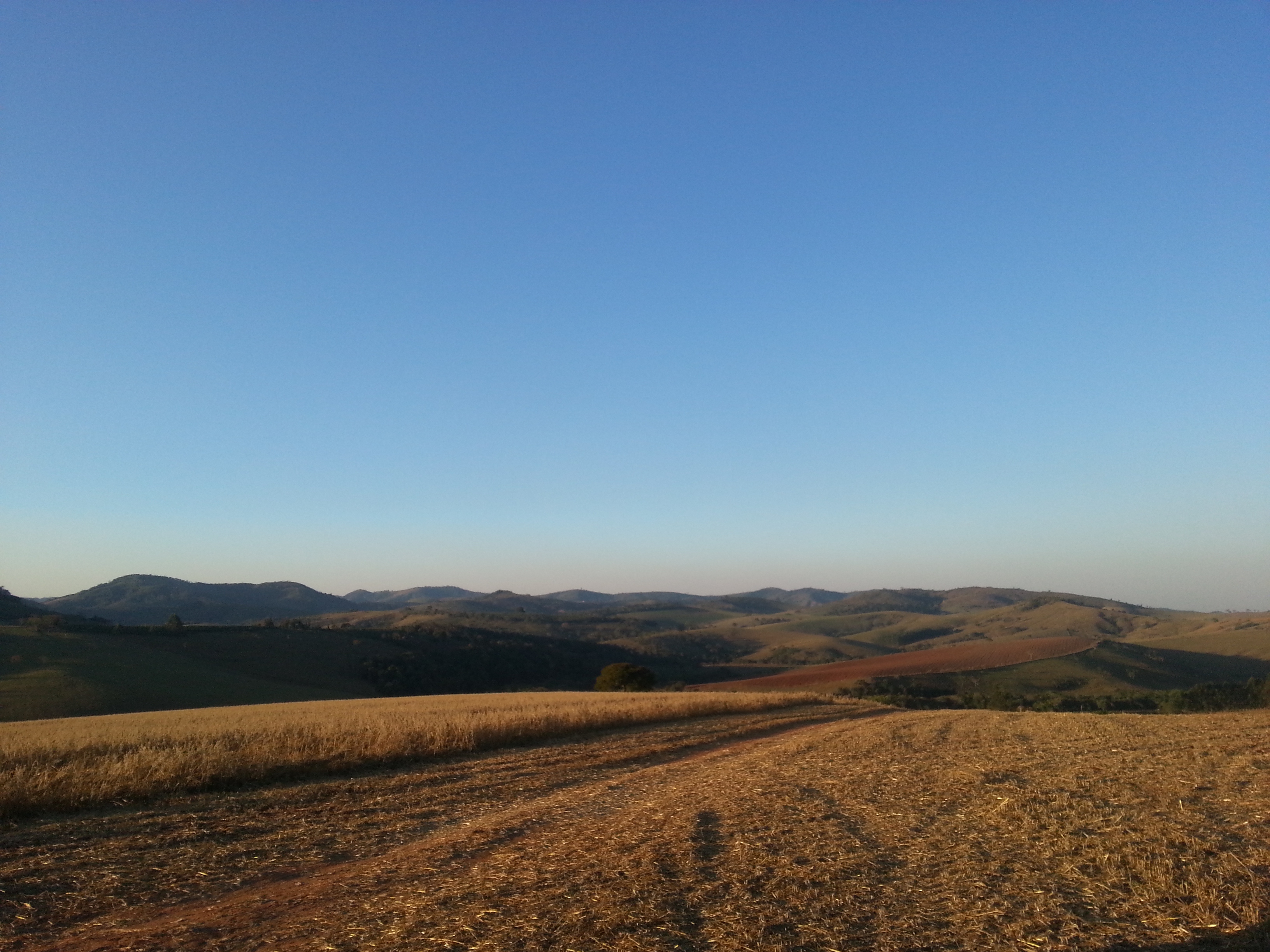 Fazenda corujas Cabo Verde MG,BR